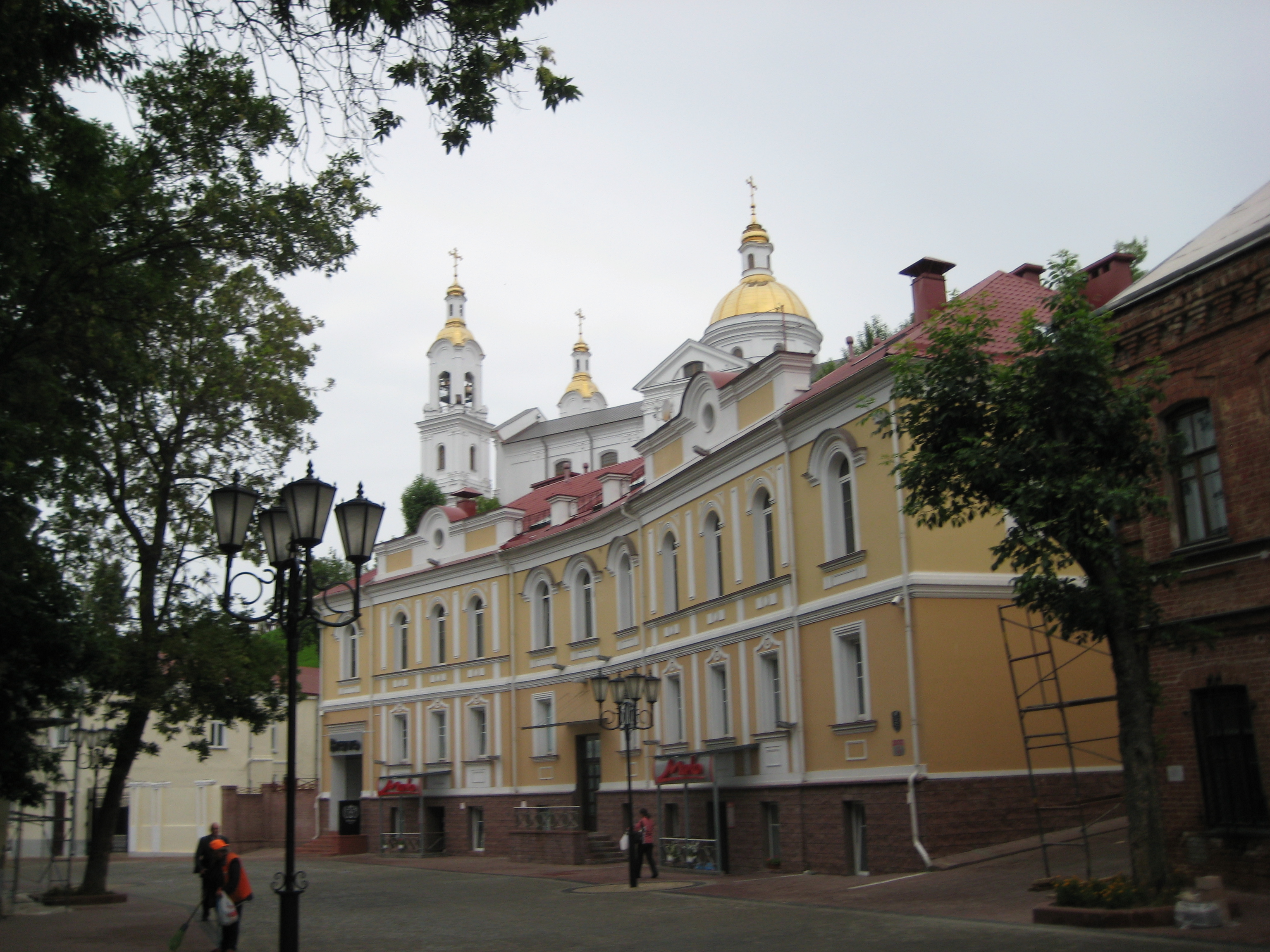 Беларуская (тарашкевіца): Забудова вул. Талстога This is a photo of Belarusian heritage monument. Reference number: 213Г000087 ( WLM)